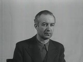 Karl Mummenthey (* 11. Juli 1906 in Aue; † unbekannt) war ein deutscher Jurist und SS-Obersturmbannführer. Mummenthey wurde im Rahmen der Nürnberger Prozesse zu lebenslanger Haft verurteilt.